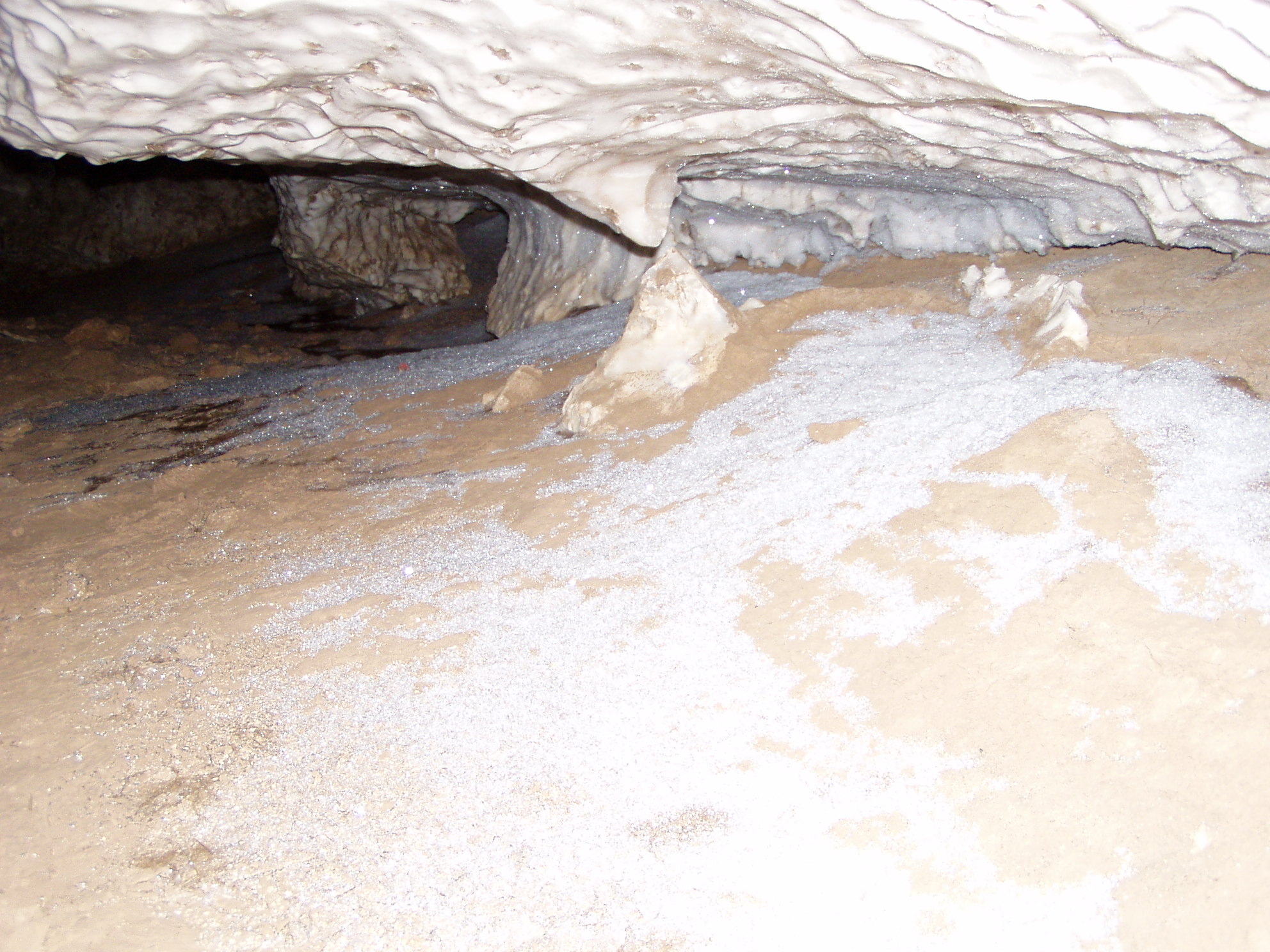 Пинежская пещера